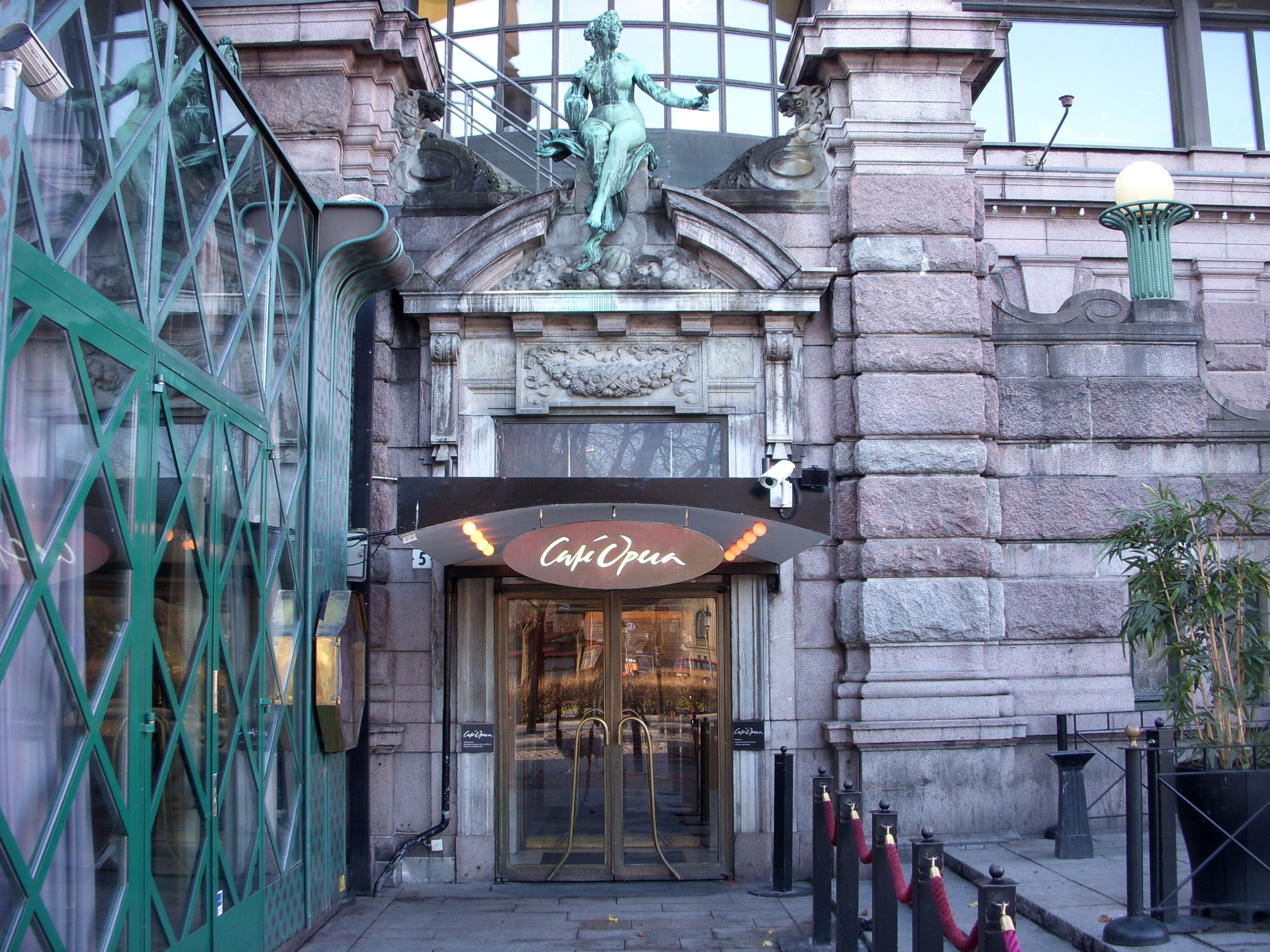 Operakällaren i Stockholm